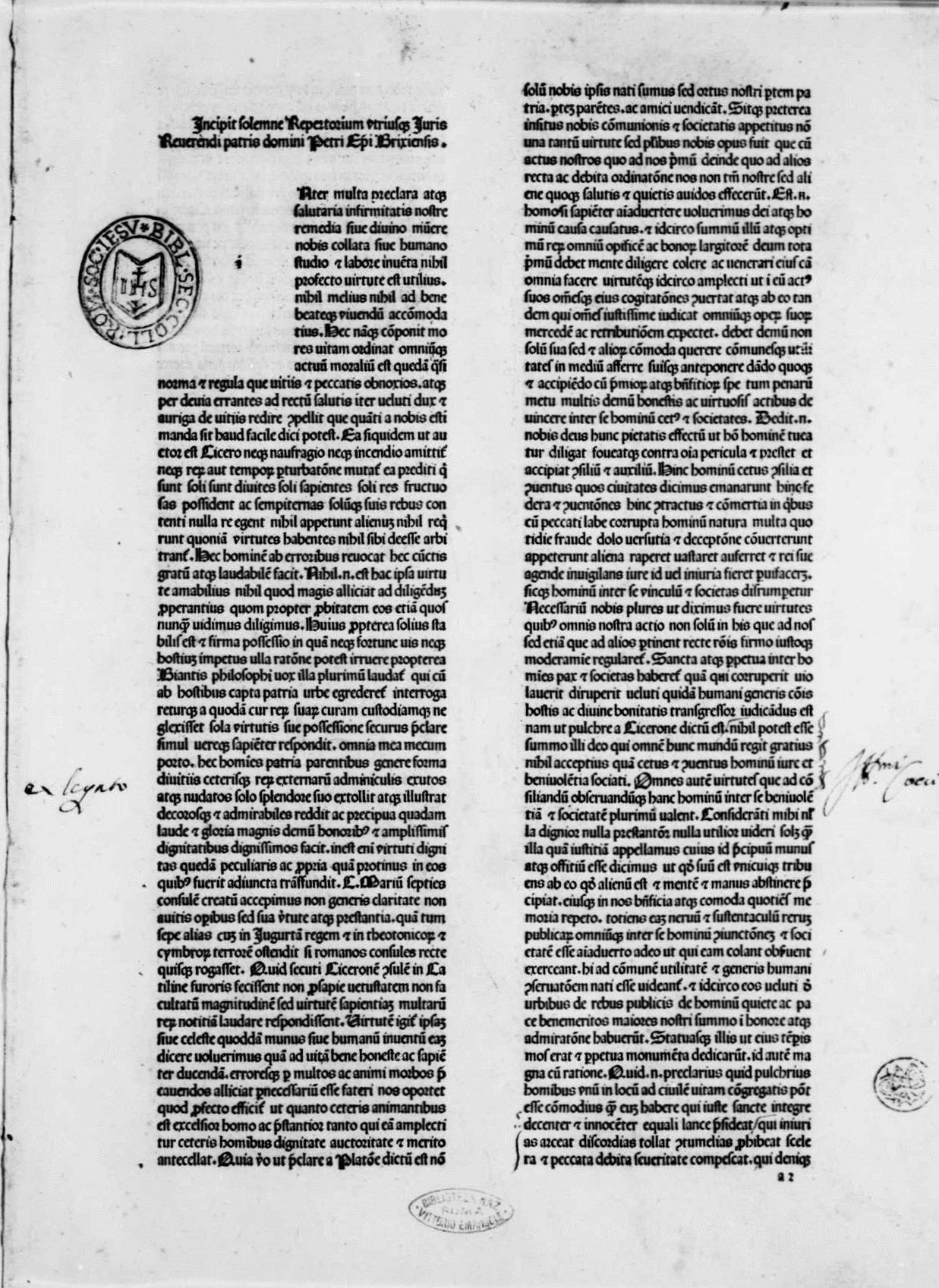 carta a2r